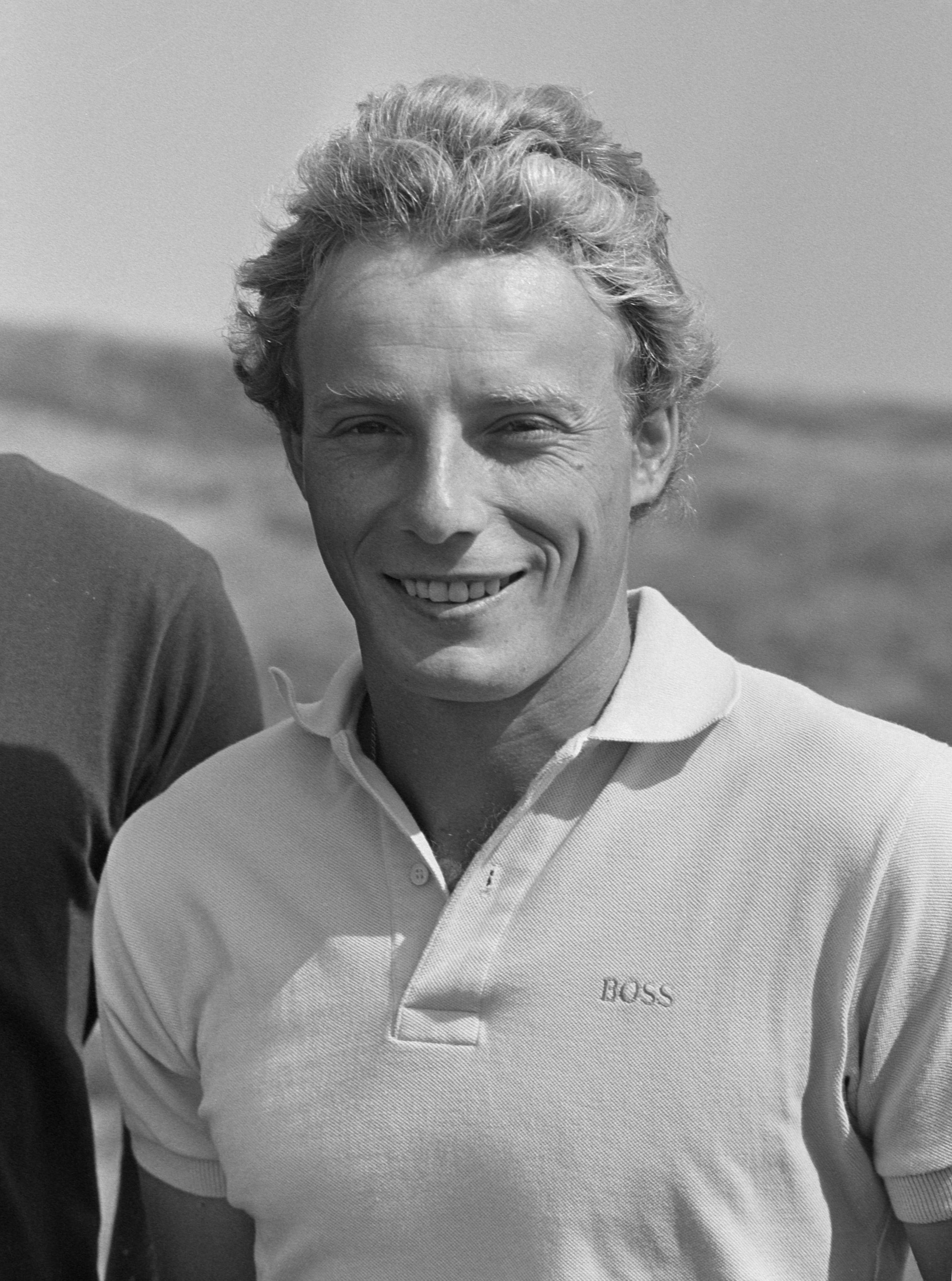 Internationaal golftoernooi in Noordwijk begint morgen; Bernhard Langer (kop)